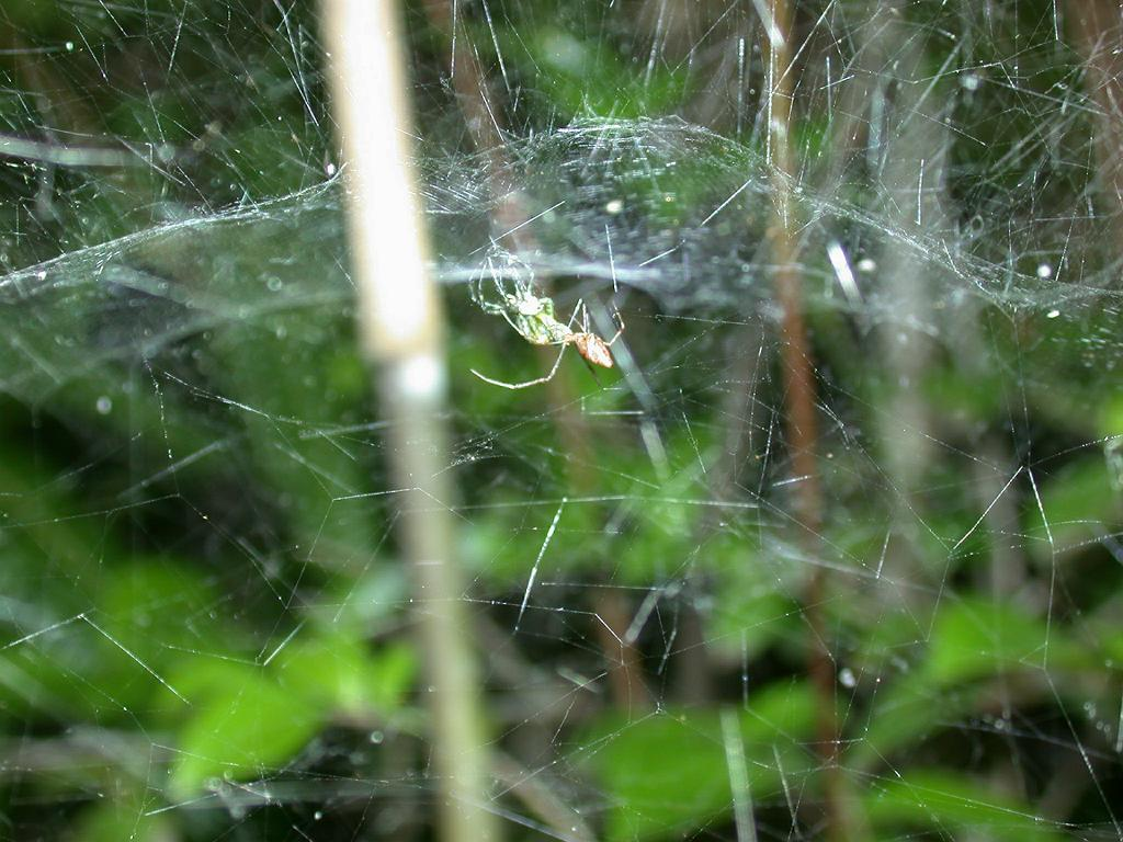 Argyrodes kumadai：チリイソウロウグモ・スズミグモを捕食中 2001/06/18 和歌山県田辺市：Tanabe City. Wakayama Pref. Japan